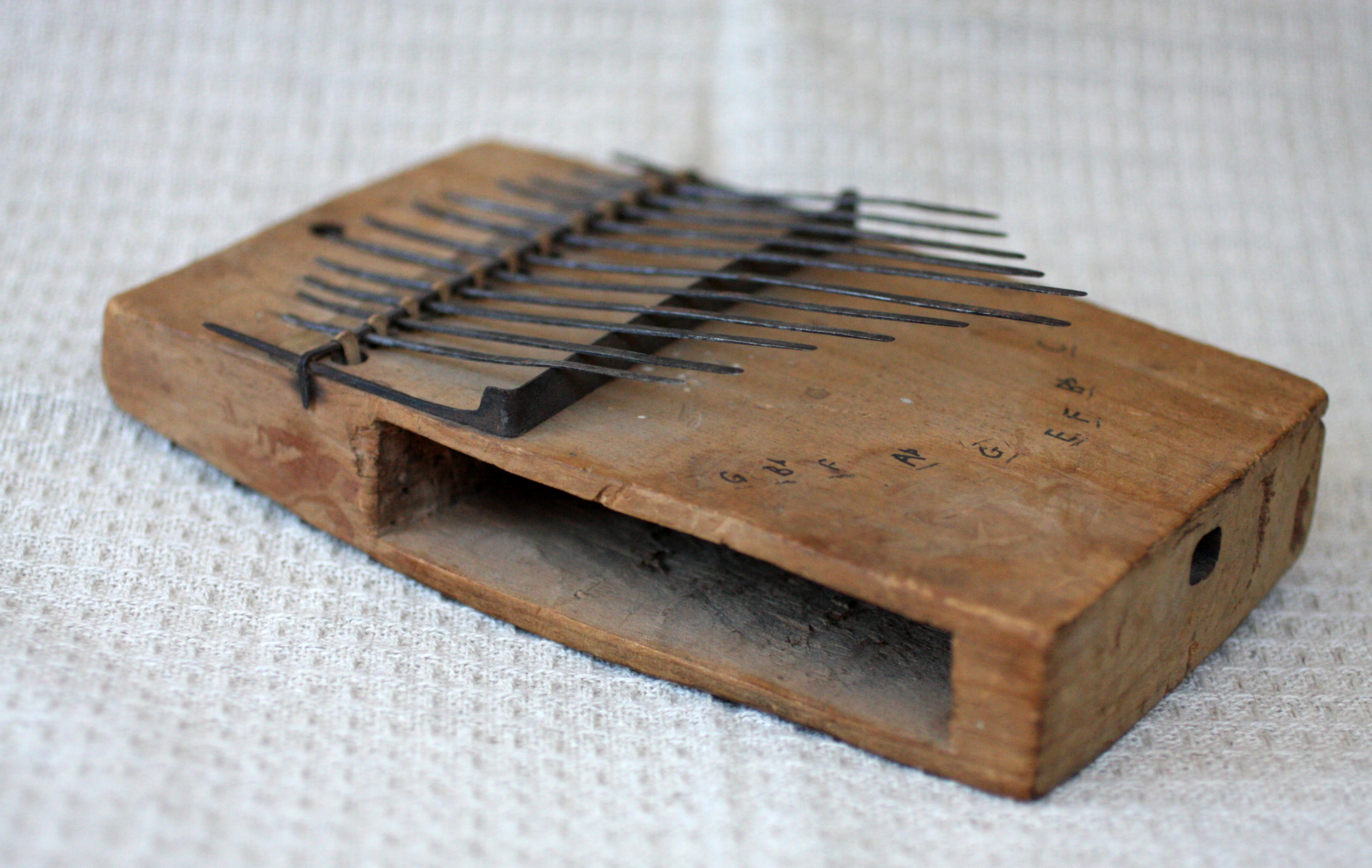 Puha fából készült régi afrikai kalimba.